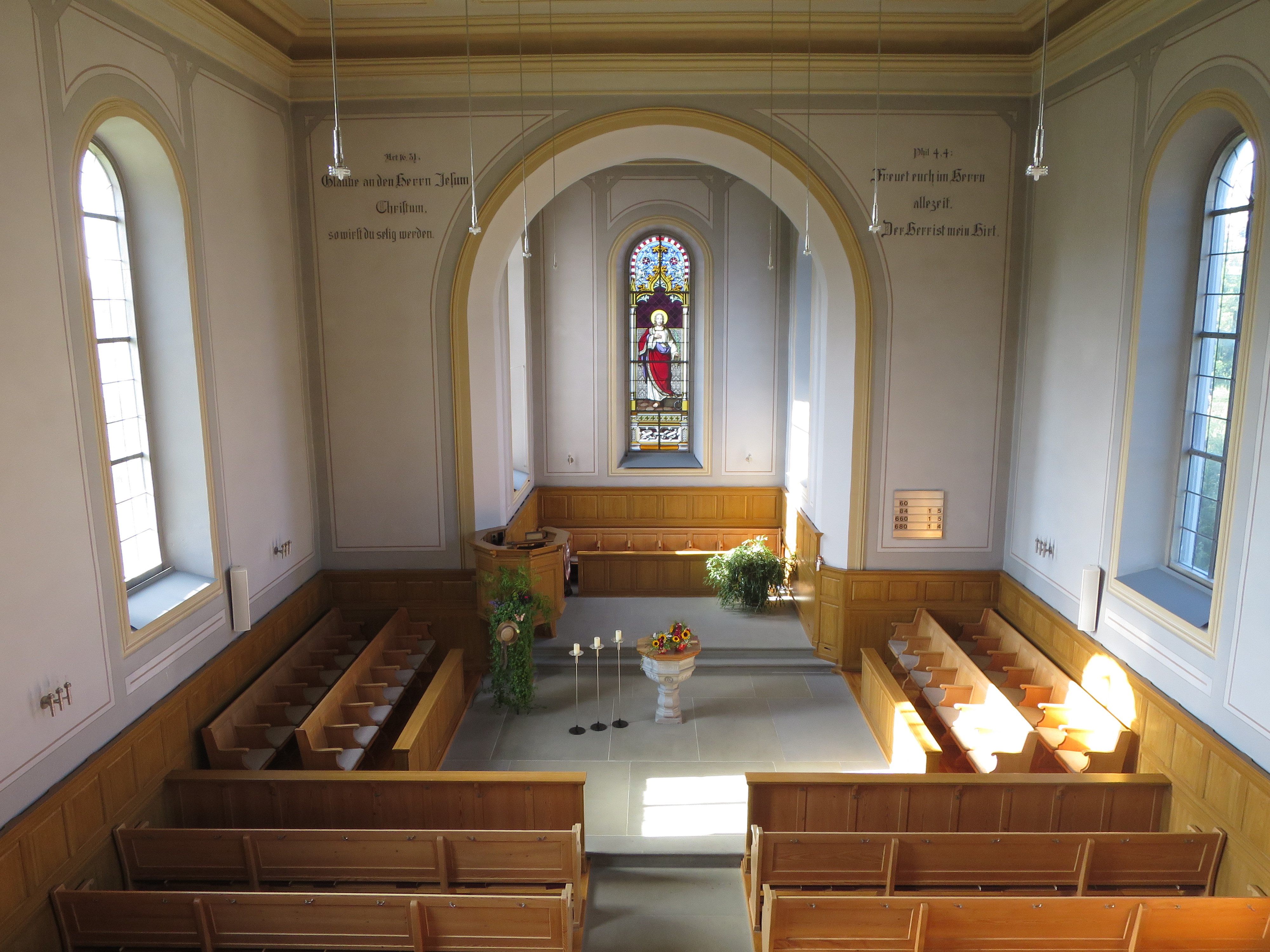 Huetten ZH - Blick von der Empore ins Schiff der reformierten Kirche